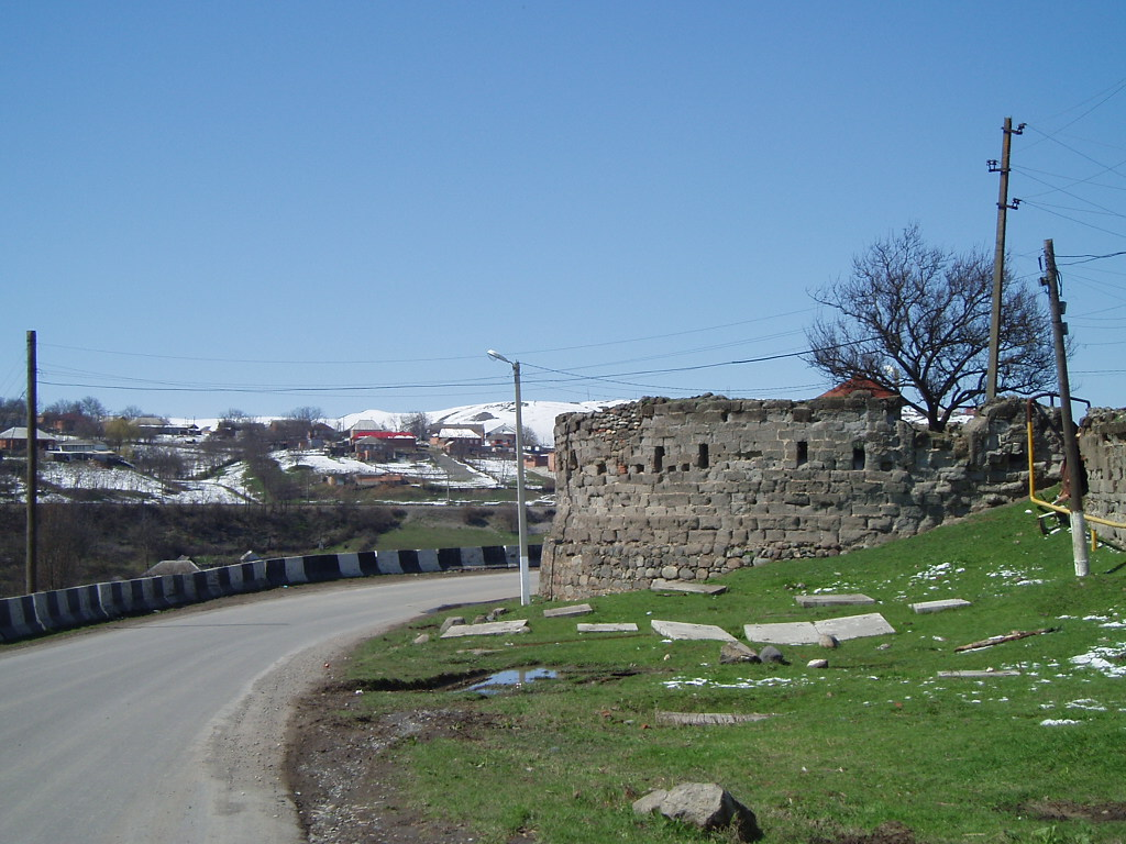 Назрановская крепость: Назрань, Ингушетия